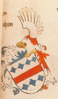 Ingeram-Codex der ehemaligen Bibliothek Cotta Stainheim freigestellt aus